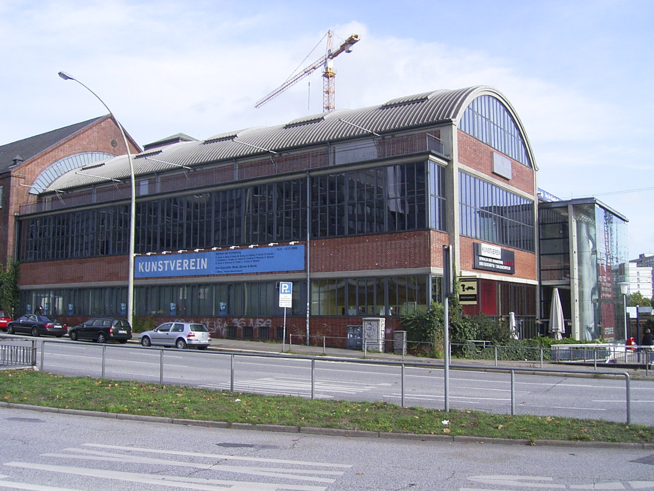 Der Kunstverein im Anbau der ehemaligen Blumenhalle des Großmarktes in Klostertor.